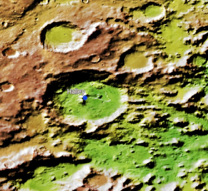 Cráter marciano Halley. (Imagen IAU/USGS/Goddard/A SU/USGS)